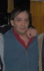 Foto mia con el periodista Carlos Llamas (recortada)